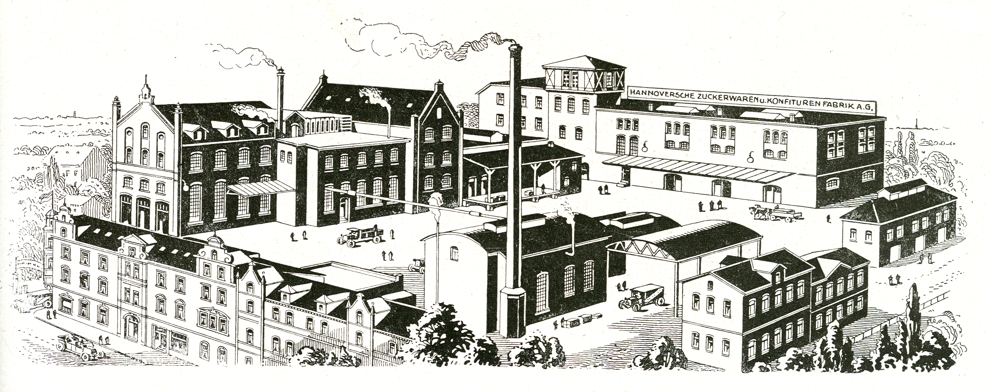 Druck eines Kupferstiches der Heuweg-Werke in Hannover; auf dem Gebäude hinten rechts ist der Schriftzug "Hannoversche Zuckerwaren und Konfitüren Fabrik A. G." zu erkennen, im Vordergrund die ehemaligen Wohngebäude an der Seilerstraße. Zumindest das Gebäude oben links hat - abgesehen vom Dachgeschoss - die Luftangriffe auf Hannover im Zweiten Weltkrieg einigermaßen schadlos überstanden. Es ist heute Teil des Kulturzentrums Eisfabrik ...